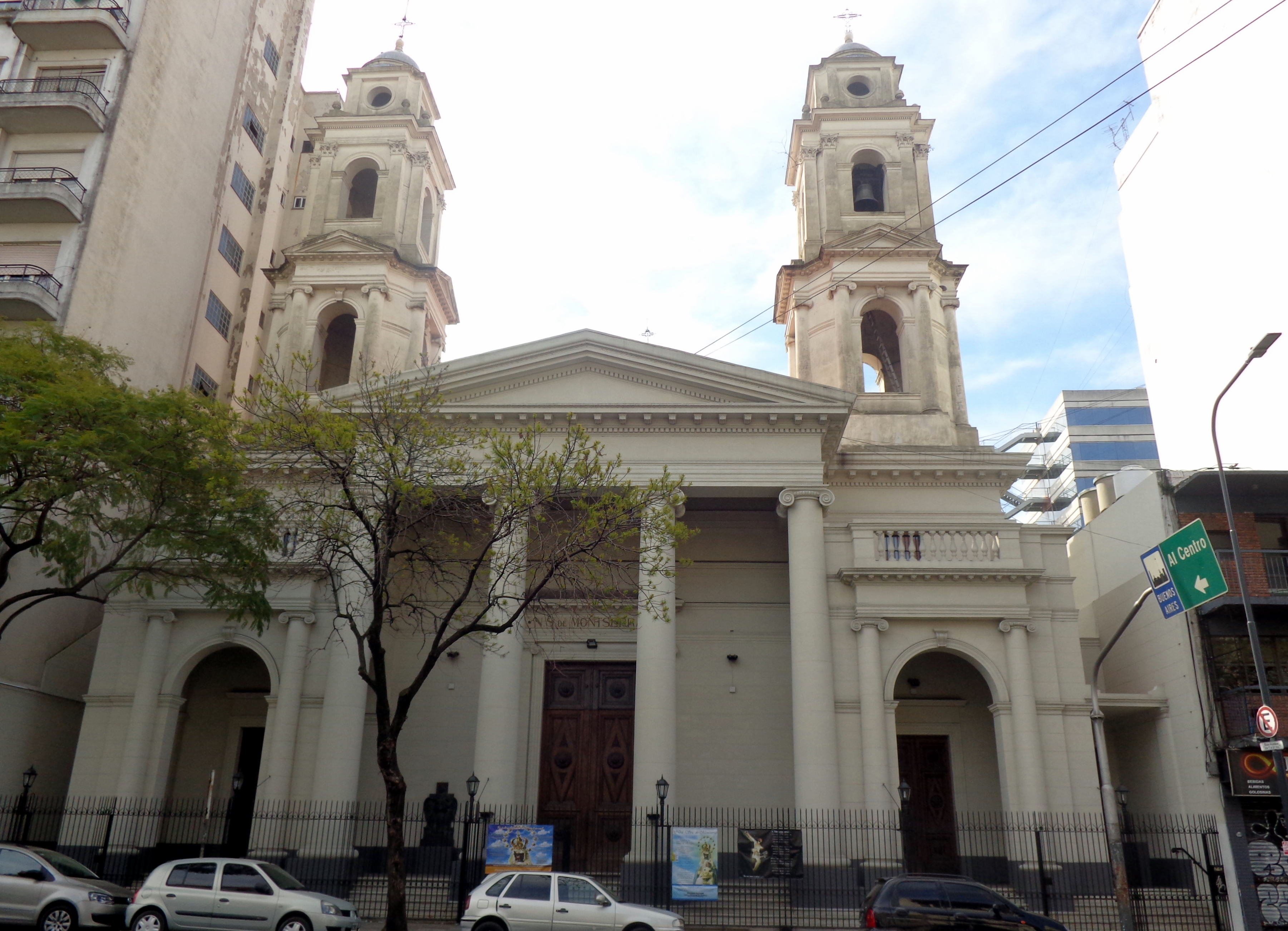 Sobre Avenida Belgrano 1151, Monserrat, Buenos Aires, Argeninta